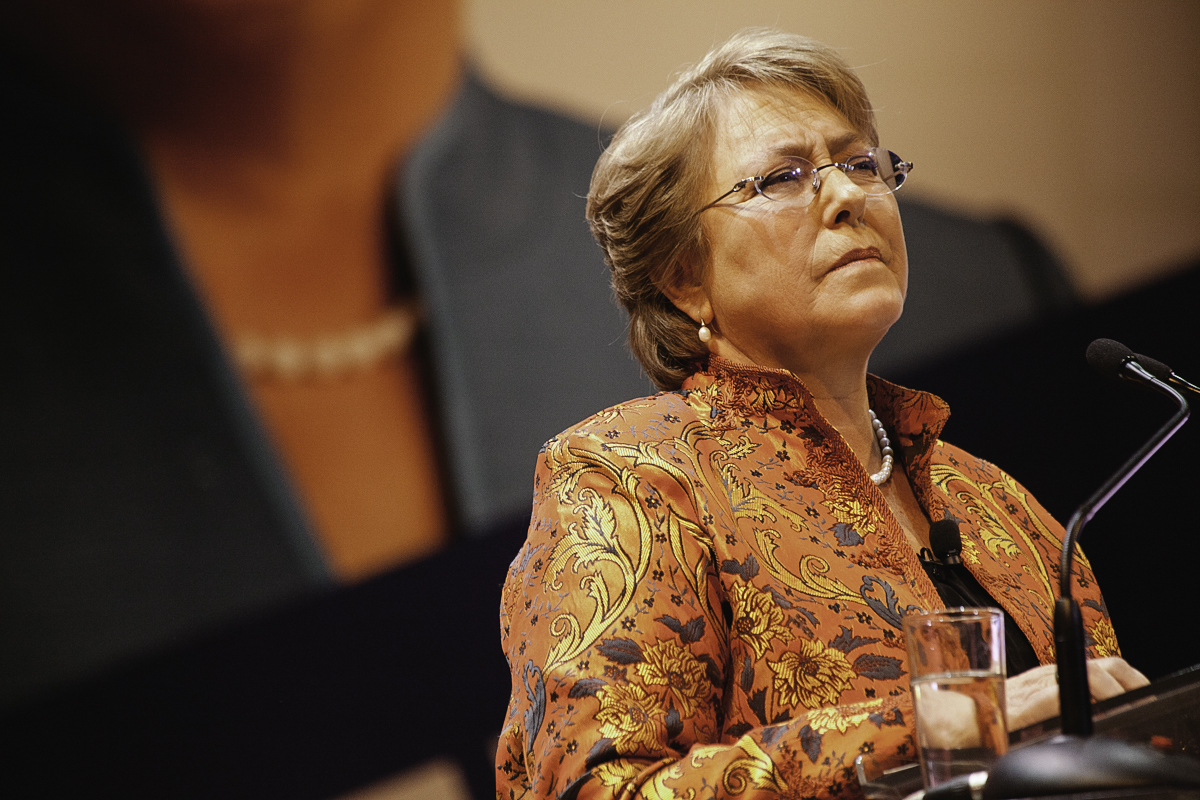 Un Teatro Caupolican lleno esperó a Michelle Bachelet para la proclamación del Partido Socialista y Partido por la Democracia, como su pre candidata presidencial.